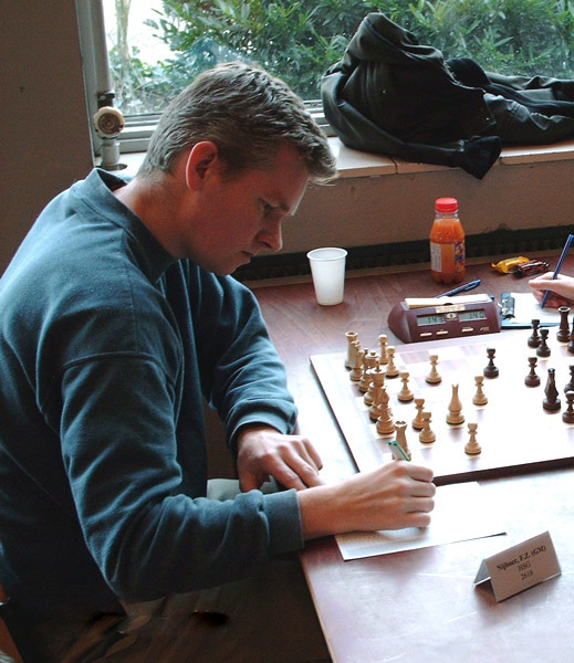 GM Friso Nijboer, Leiden 2007